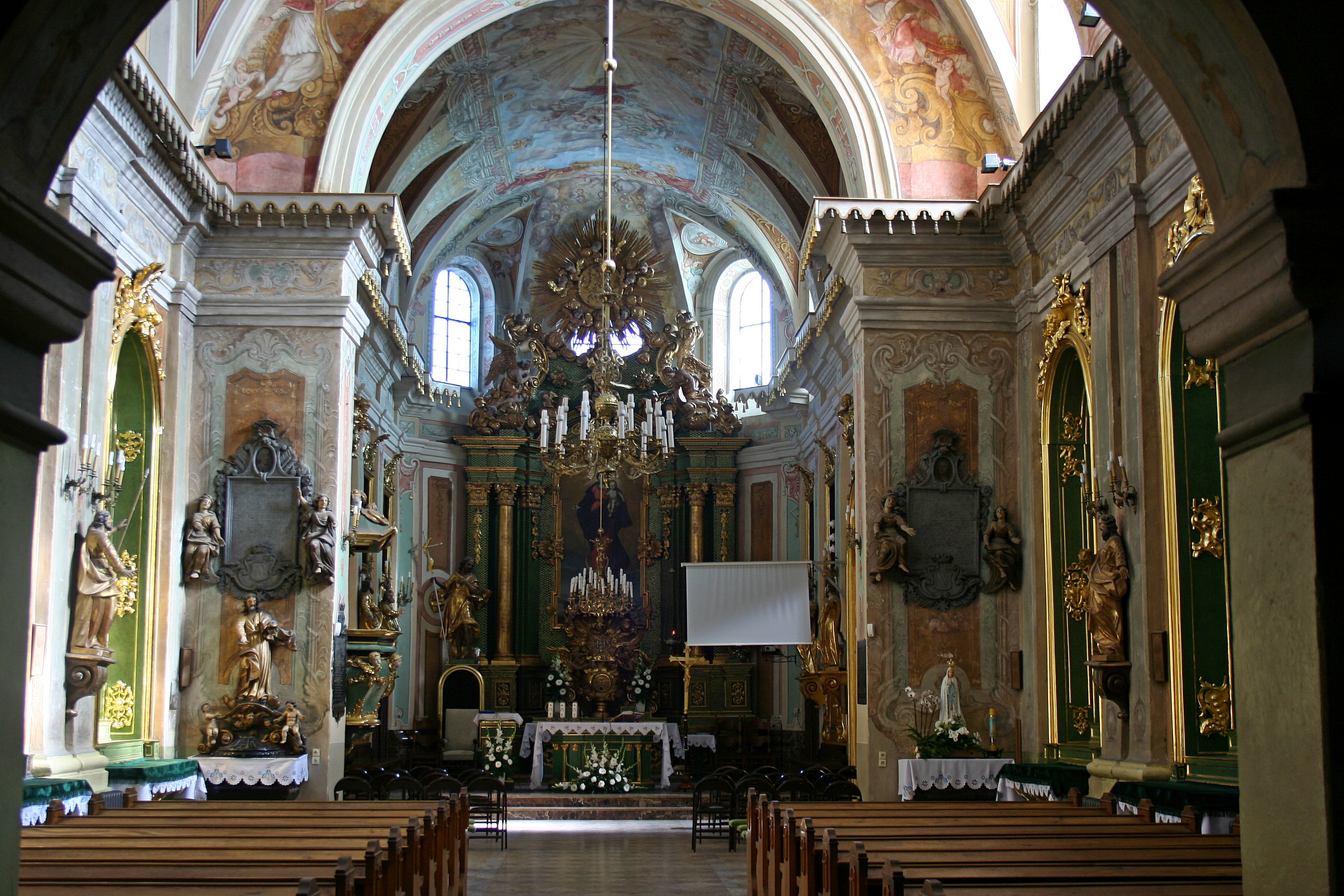 Opole Lubelskie, ul. Kościuszki 4 - zespół klasztorny pijarów: kościół, obecnie p.w. Wniebowzięcia NMP (zabytek nr rejestr. A/152)